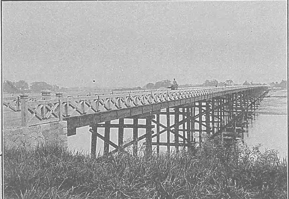 説明文に「共に北陸七大河の一なる神通川に架したるもの萩浦橋は私設にして最も下流に位し上新川郡東岩瀬町婦負郡草島村の間に在り長さ二百二十間神通大橋は富山市の西北に在り官設鉄道北陸線の鉄橋と並び同川馳越線に架せり長さ二百二十八間新大橋は其上流に在りて長二百三十八間余富山市より歩兵第六十九聯隊に通ずる道路の開通に伴ひ新設せしものなり」とあり